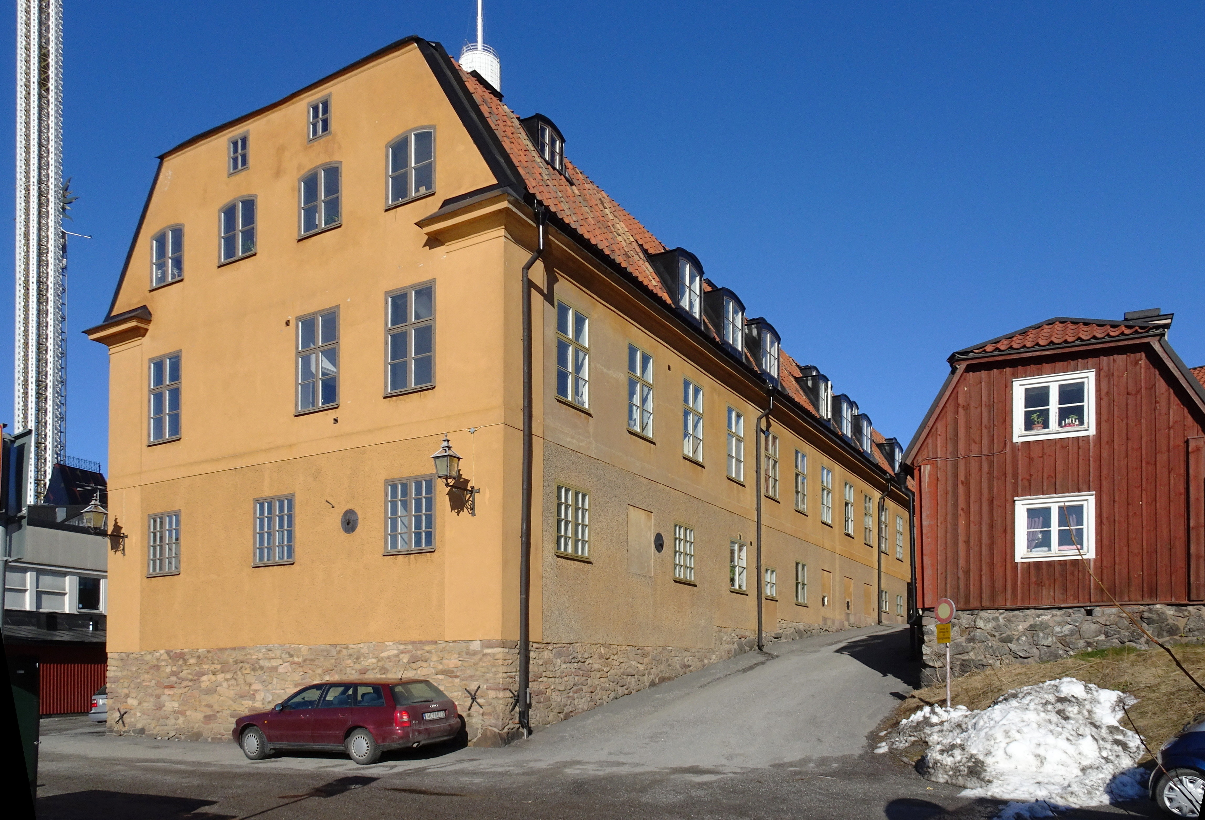 Fastigheten Djurgården 1:35, Djurgårdsstaden, byggd för Djurgårdsvarvet som varvskontor och bostäder 1769. Ritad av Fredrik Henrik af Chapman.